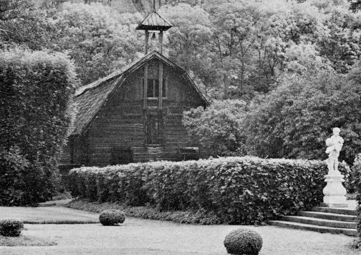 Beatelund, röda stallet, gårdens äldsta bevarade byggnad